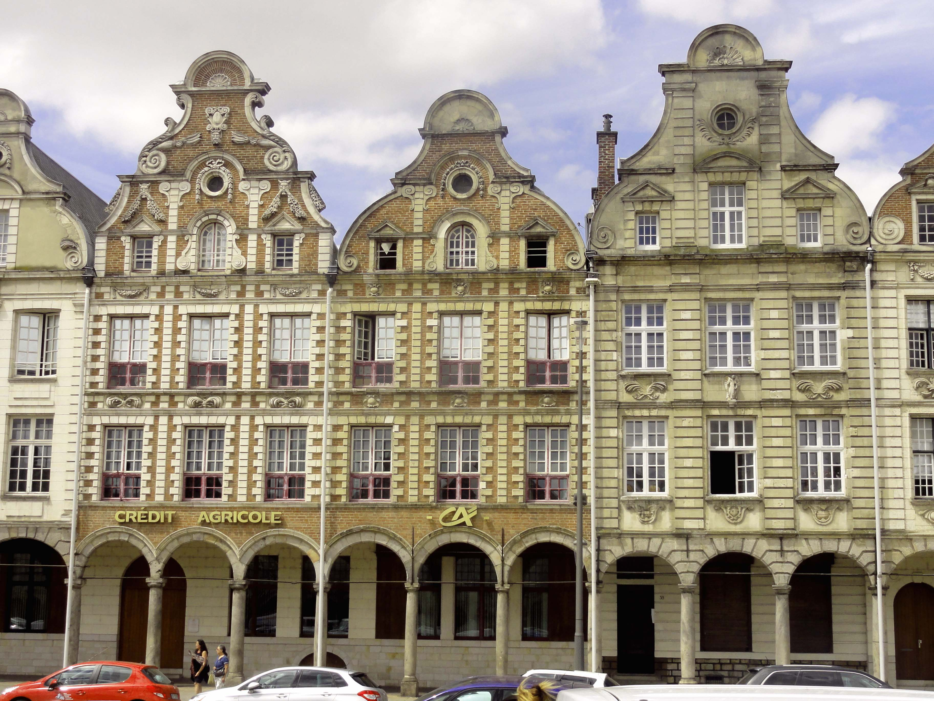 La Grand'Place d'Arras.